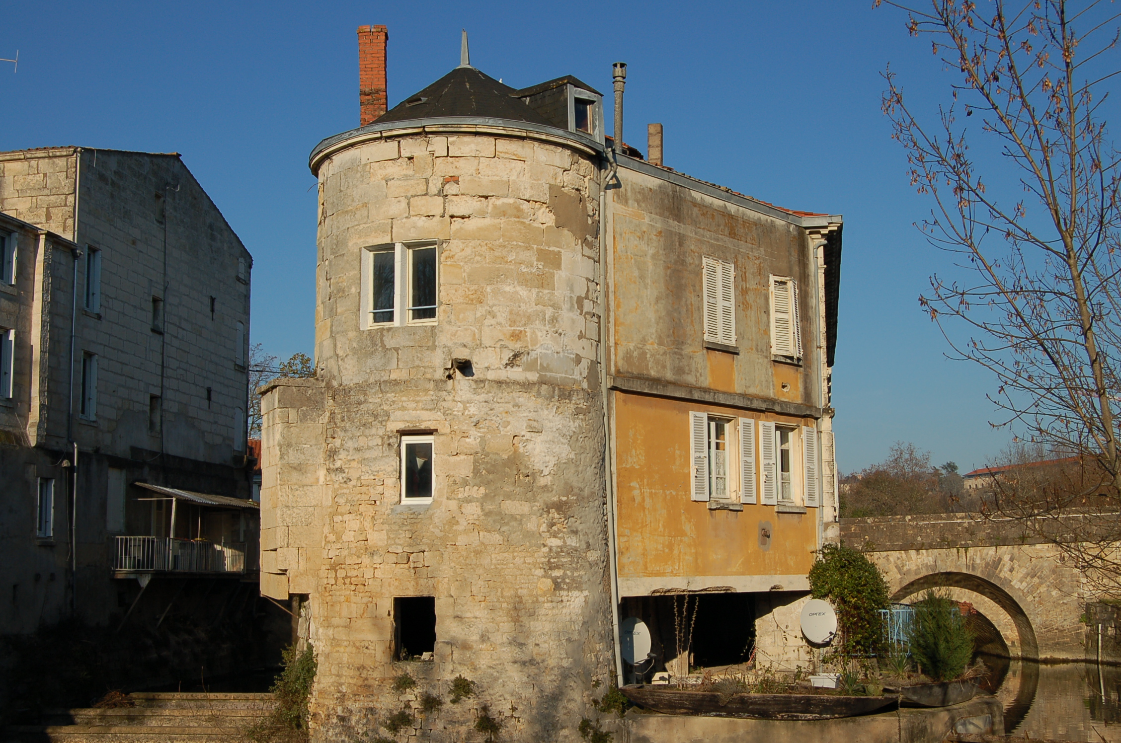 Les anciens bains Juin, à Niort (France - Deux-Sèvres)